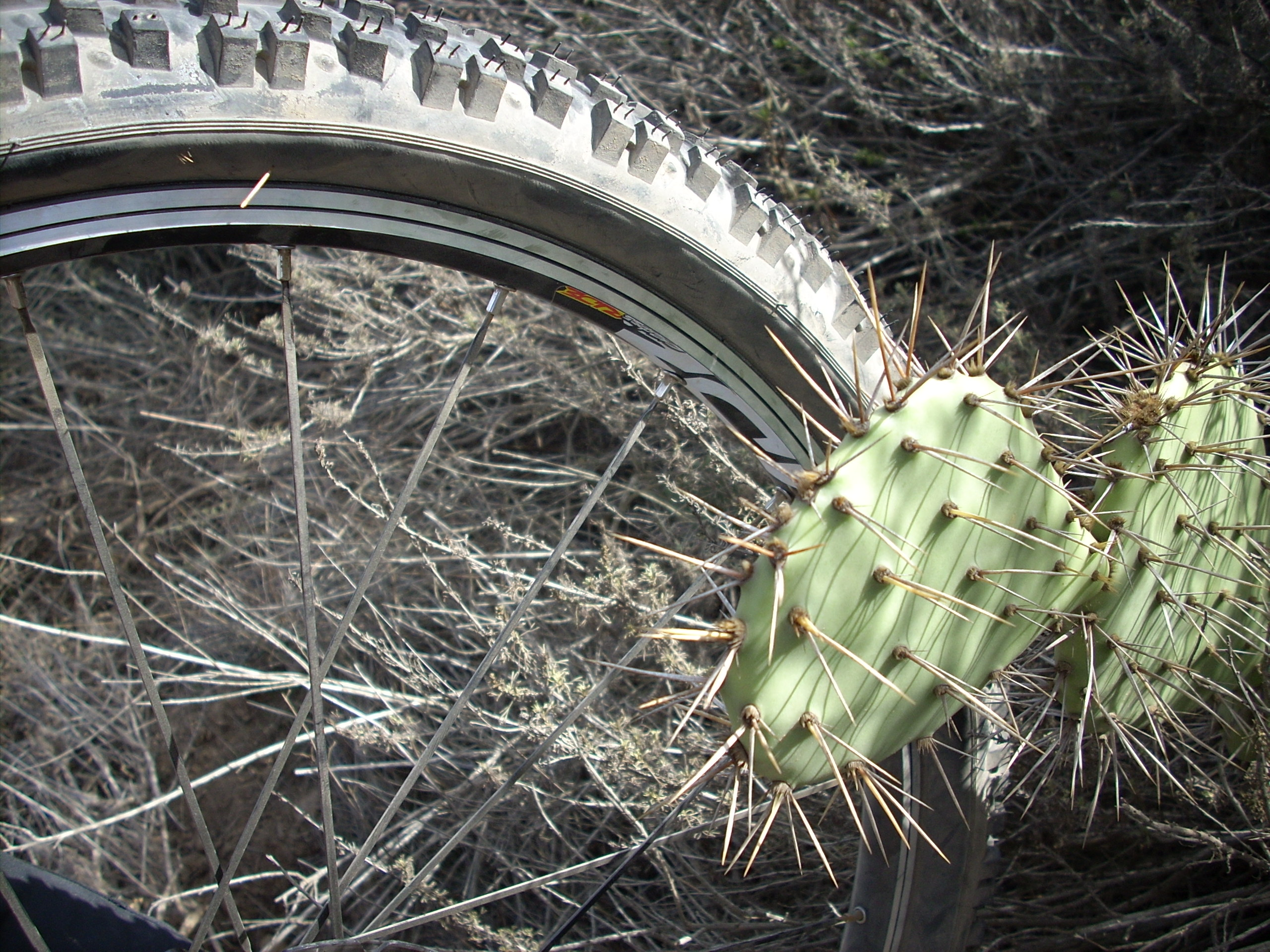 Puncture